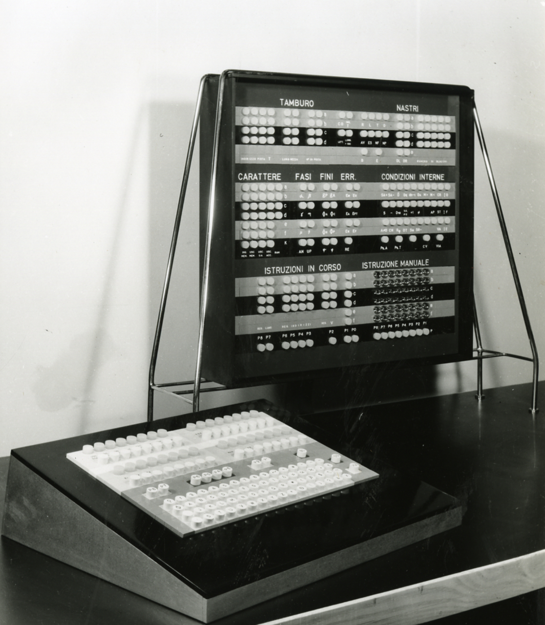 Servizio fotografico : Italia, 1968 / Paolo Monti. - Stampe: 4 : Positivo b/n, gelatina bromuro d'argento/ carta, 18x24. - ((Sul coperchio della scatola iscrizione didascalica manoscritta a pennarello nero: "Codussi (Arch.) 1"